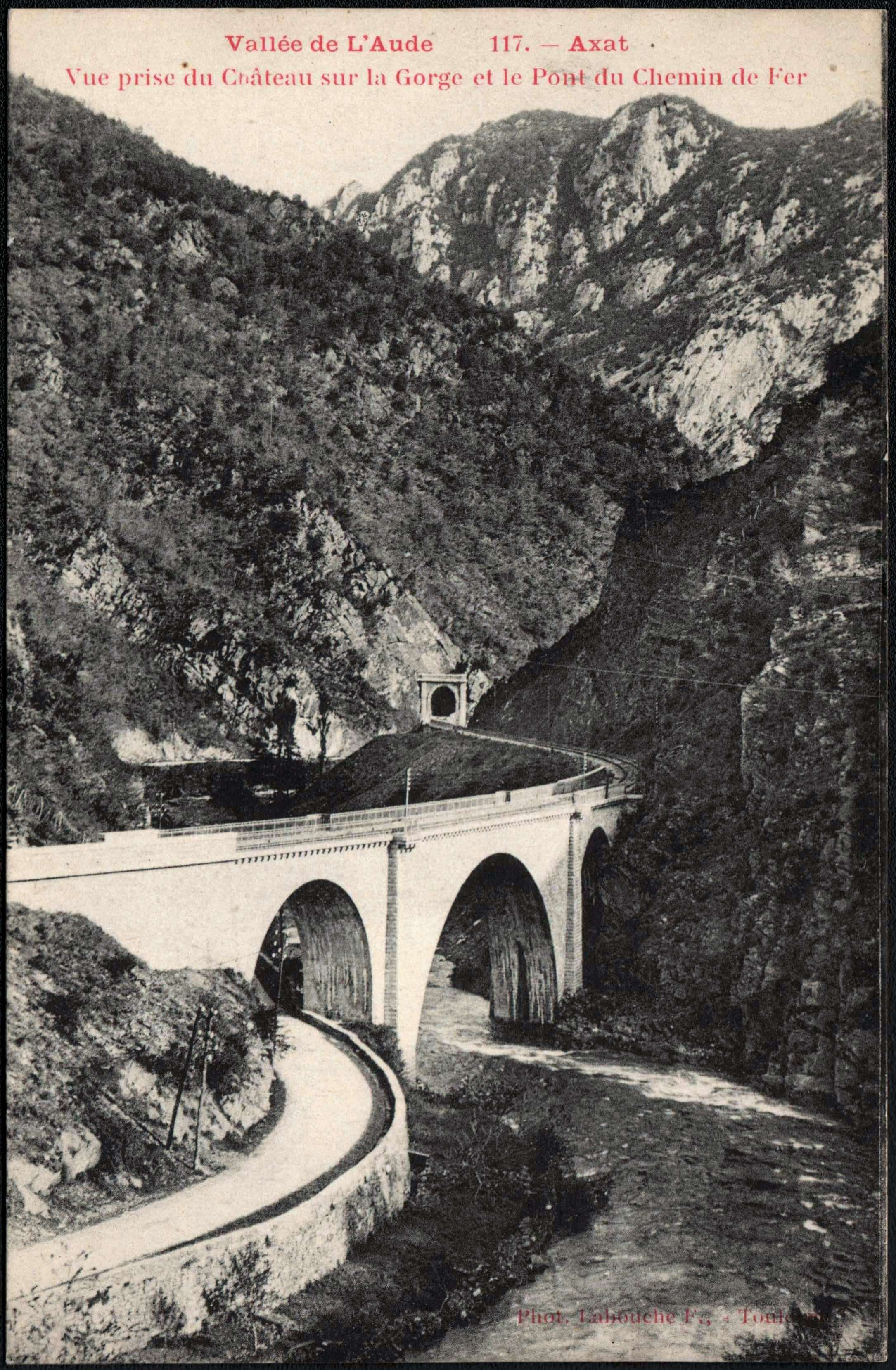 Vall'ee de L'Aude 117.-Axat Vue prise du Chàteau sur la Gorge et le Pont du Chemin de Fer - LF toulouse